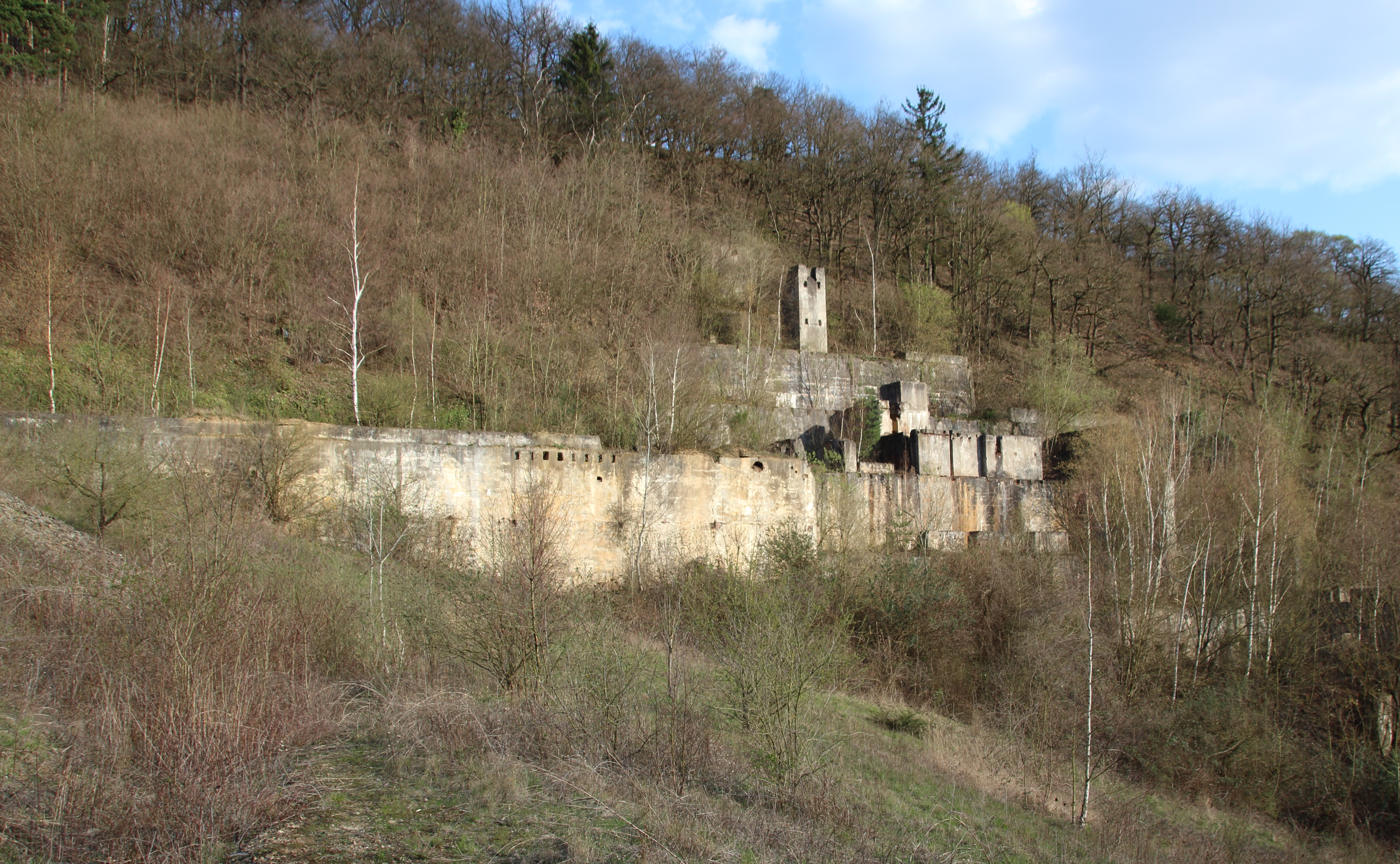 Grube Rosenberg: Reste der Aufbereitungsanlagen am Kerkertser. Braubach.